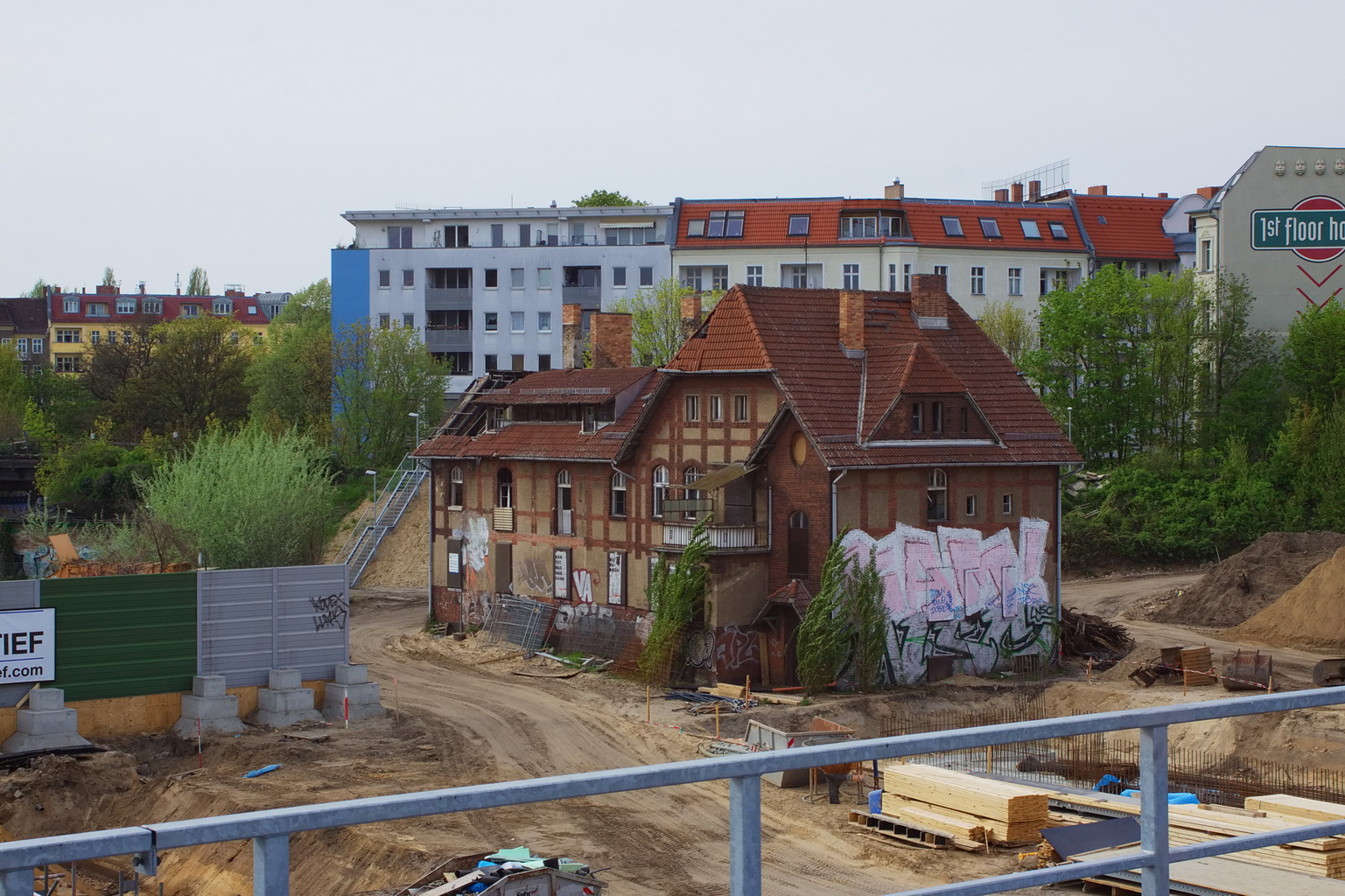 Berlin Ostkreuz